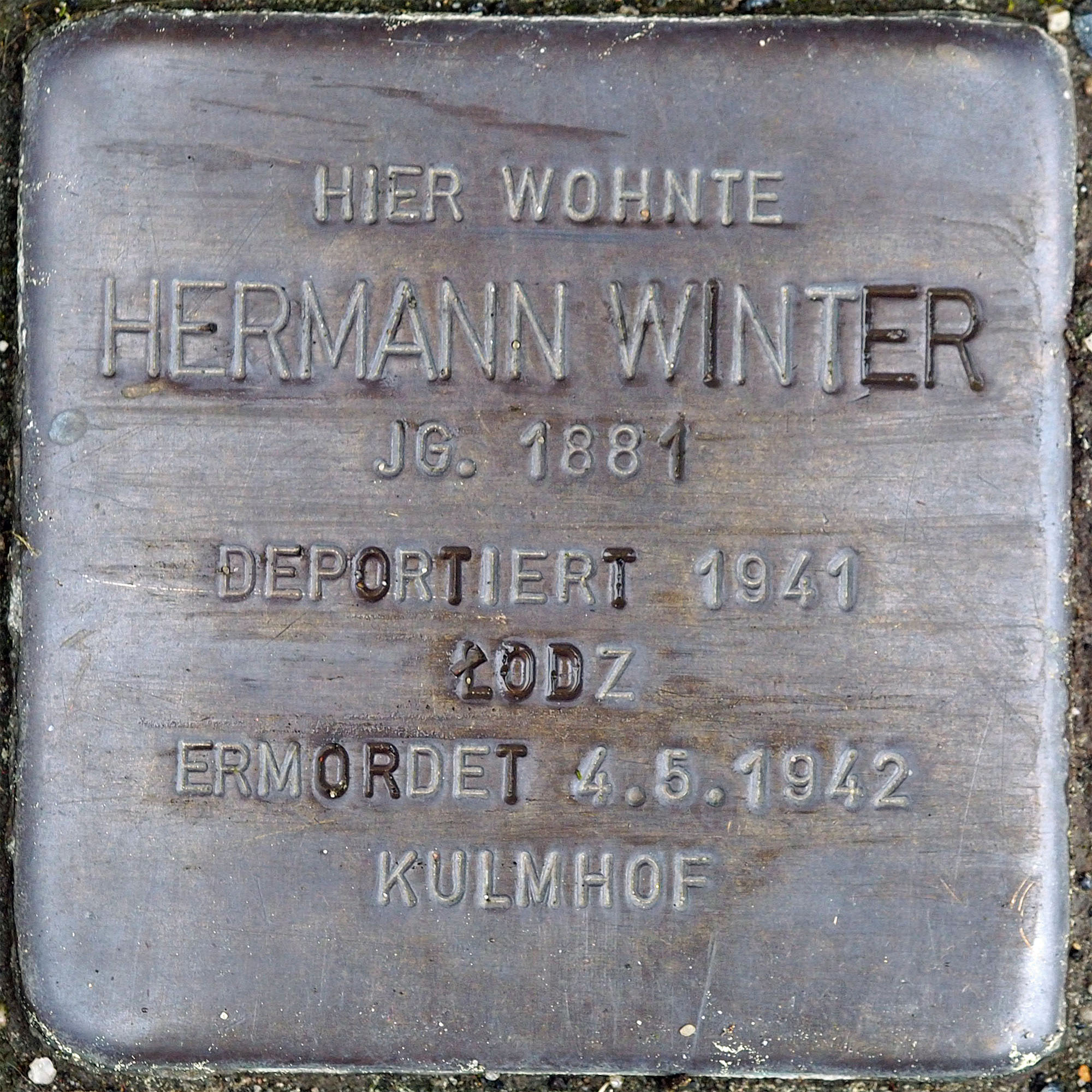 Stolpersteine Korschenbroich: Winter, Hermann (1881)